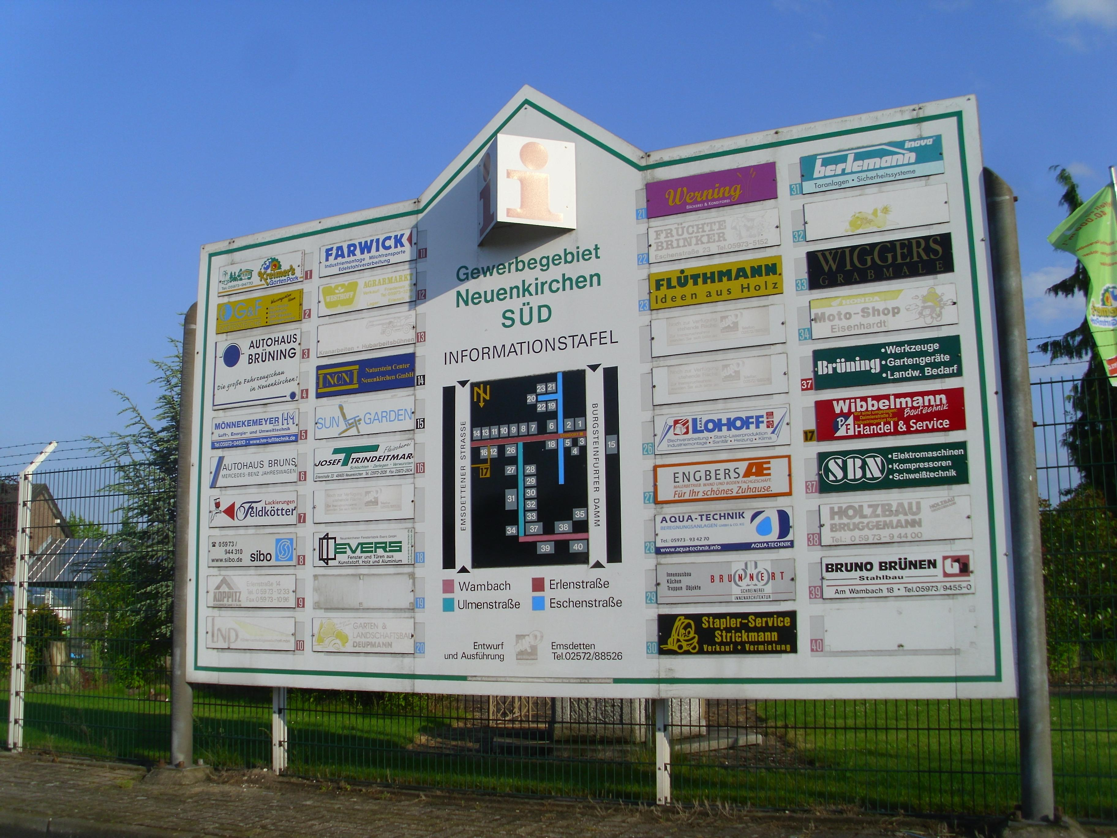 Gewerbegebiet Neuenkirchen-Süd (Kreis Steinfurt), Informationstafel